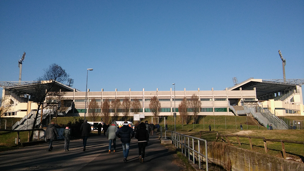 Außenansicht des Stadions